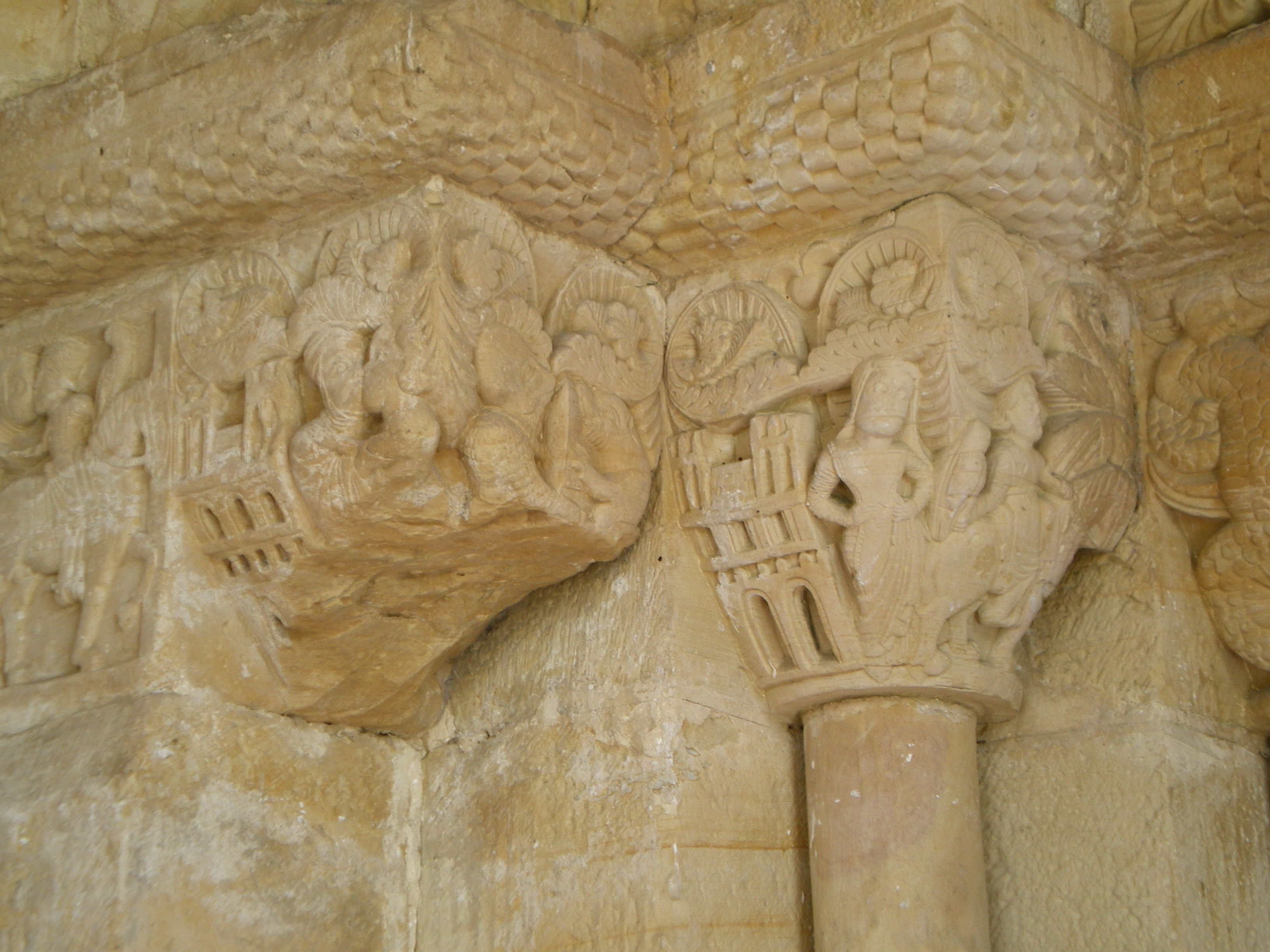 Monasterio de San Pedro de Villanueva (s.XII) - Portada - Detalle: historia de Favila; de izq. a dcha. partida para la jornada de caza, despedida de su esposa Froiluba a la puerta de palacio y la lucha con el oso.